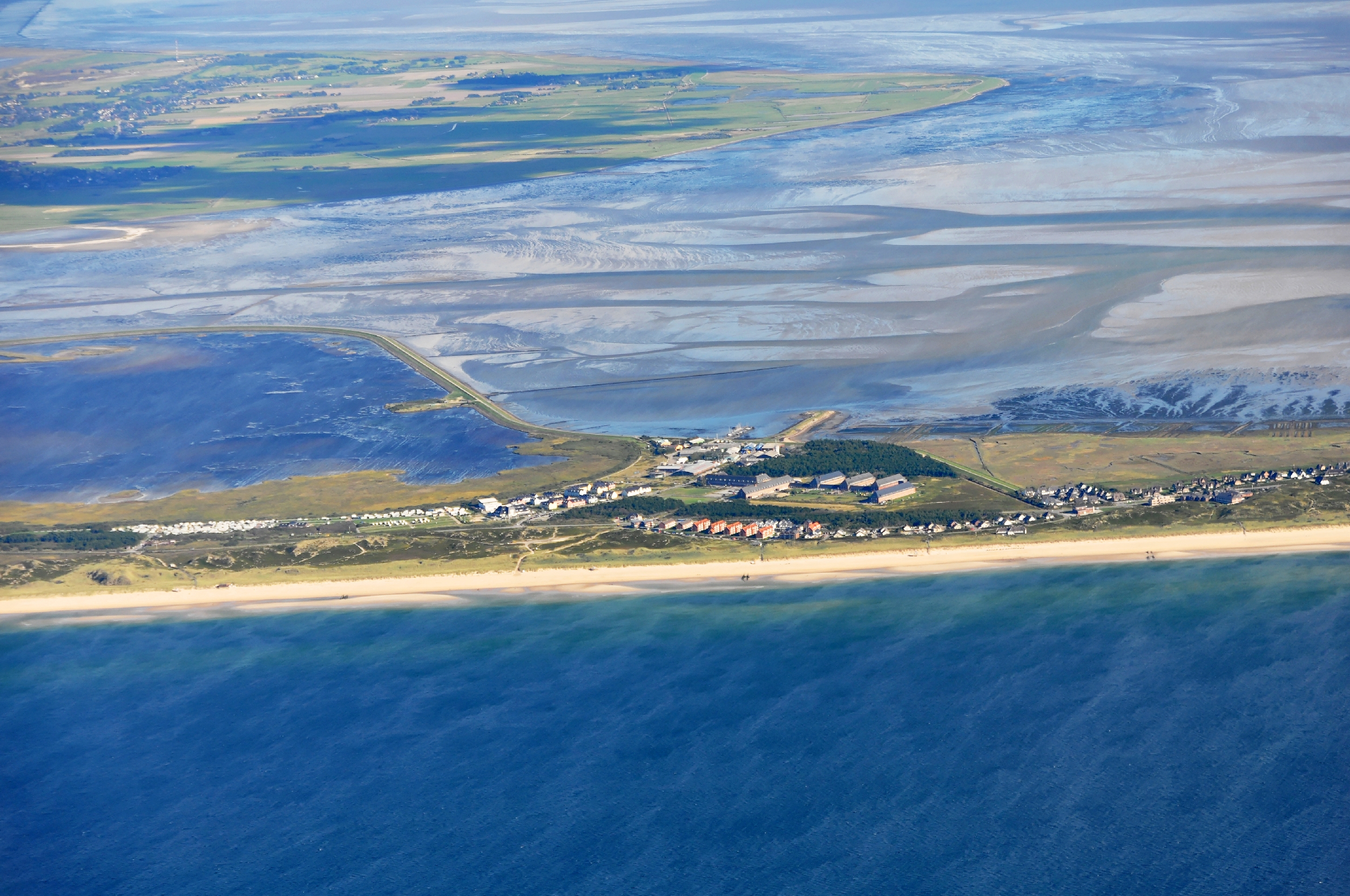 Luftaufnahme Nordseeküste 2013-09: Rantum auf der Insel Sylt mit Teilen der Naturschutzgebiete „Baakdeel-Rantum/Sylt“ und „Rantumbecken“